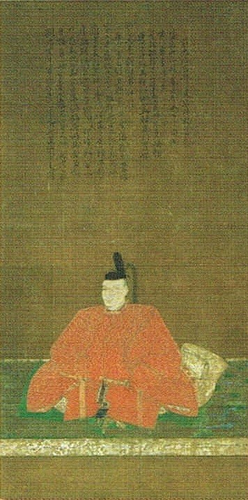 村上頼勝の肖像。